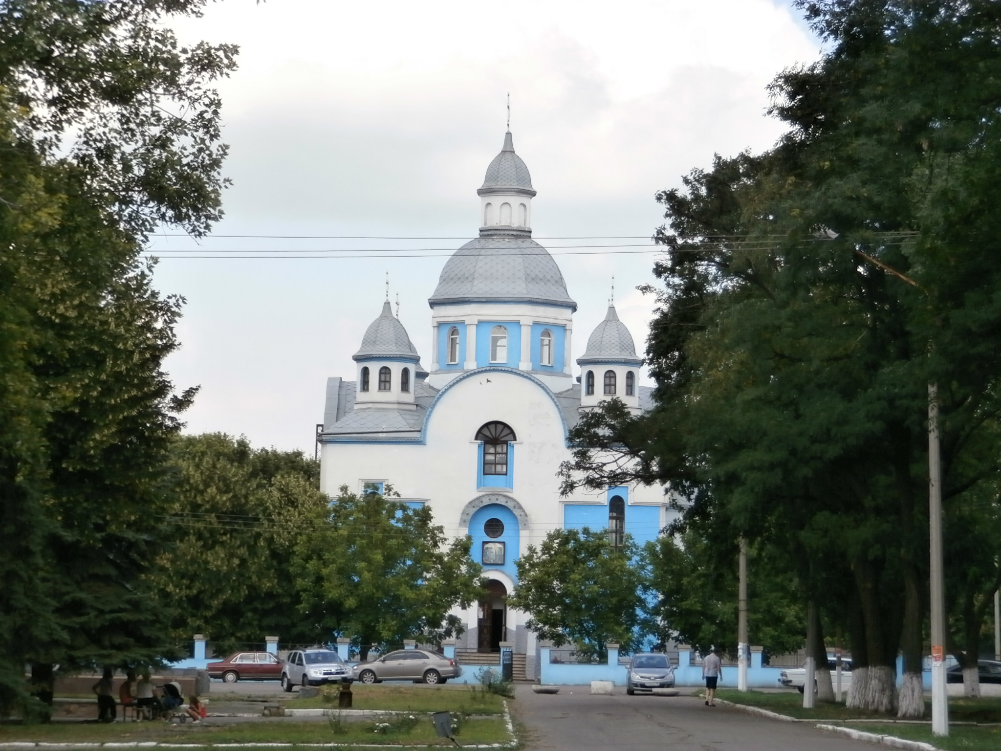 Pjatychatky Kirche